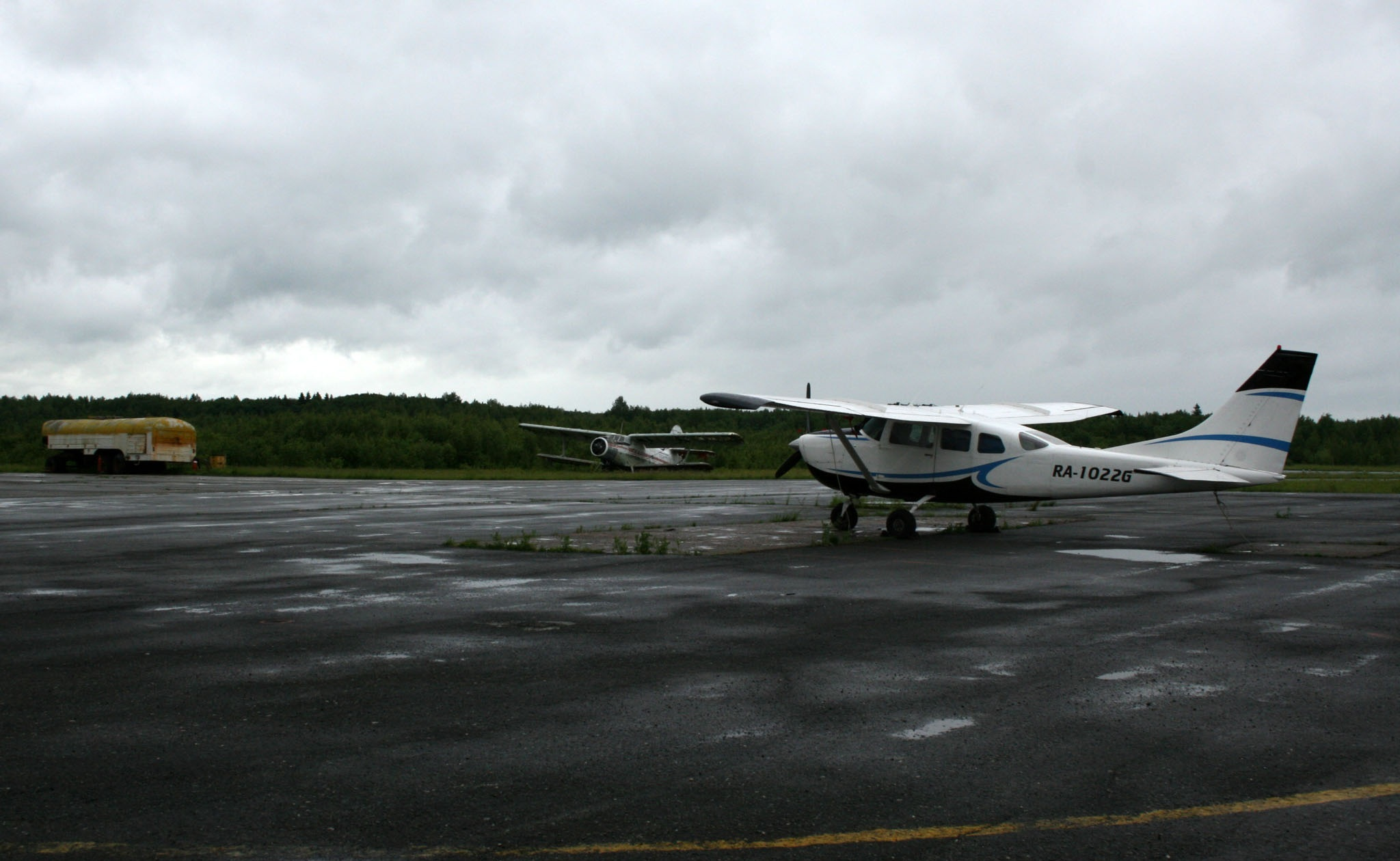 Самолеты на стоянке в Березниках